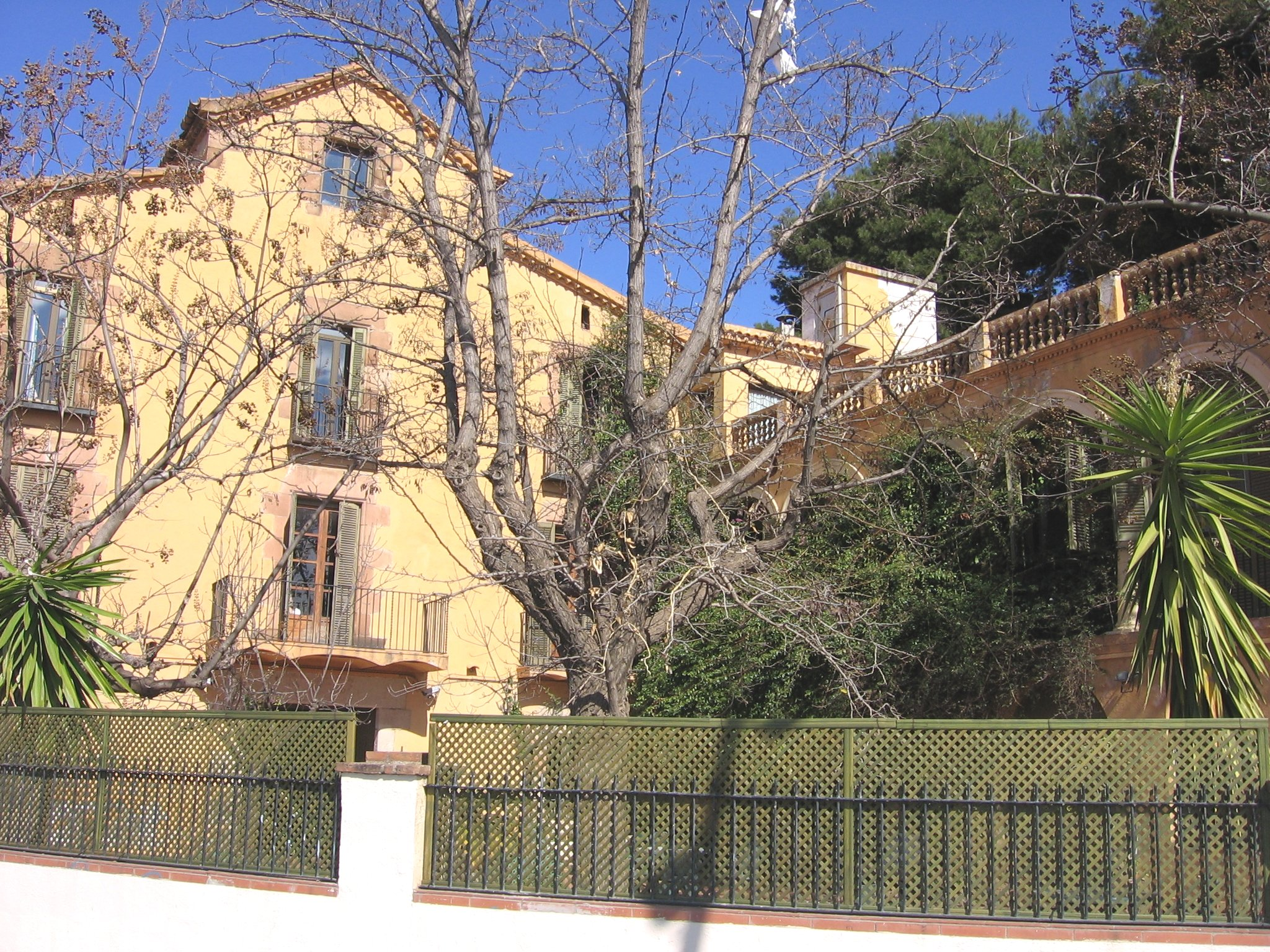 Can Móra, El Carmel (Barcelona).